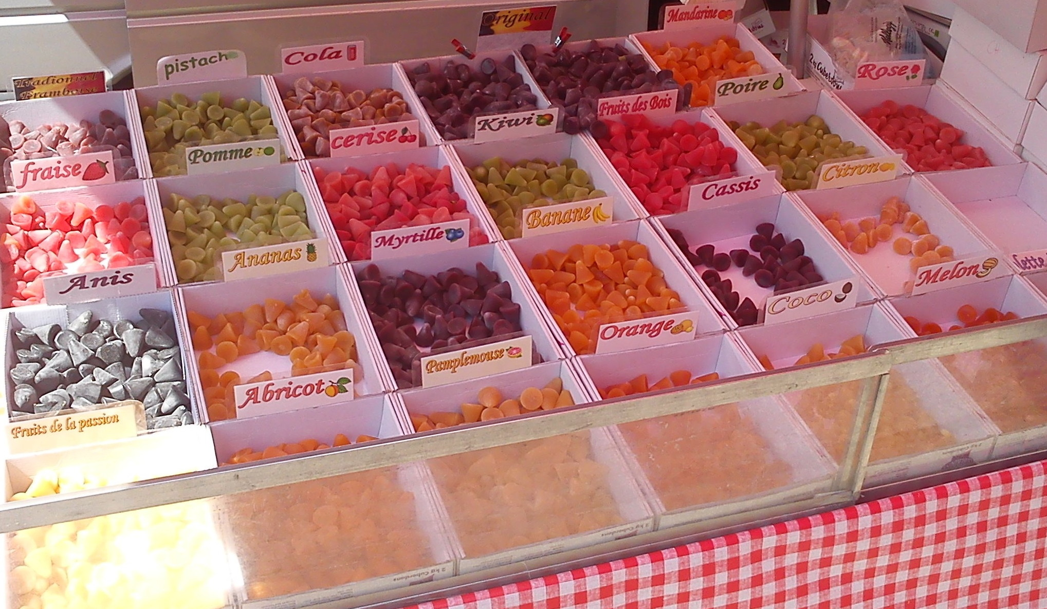 Variété de cuberdons, photographiée sur un marché à Pecrot (Brabant wallon, Belgique)